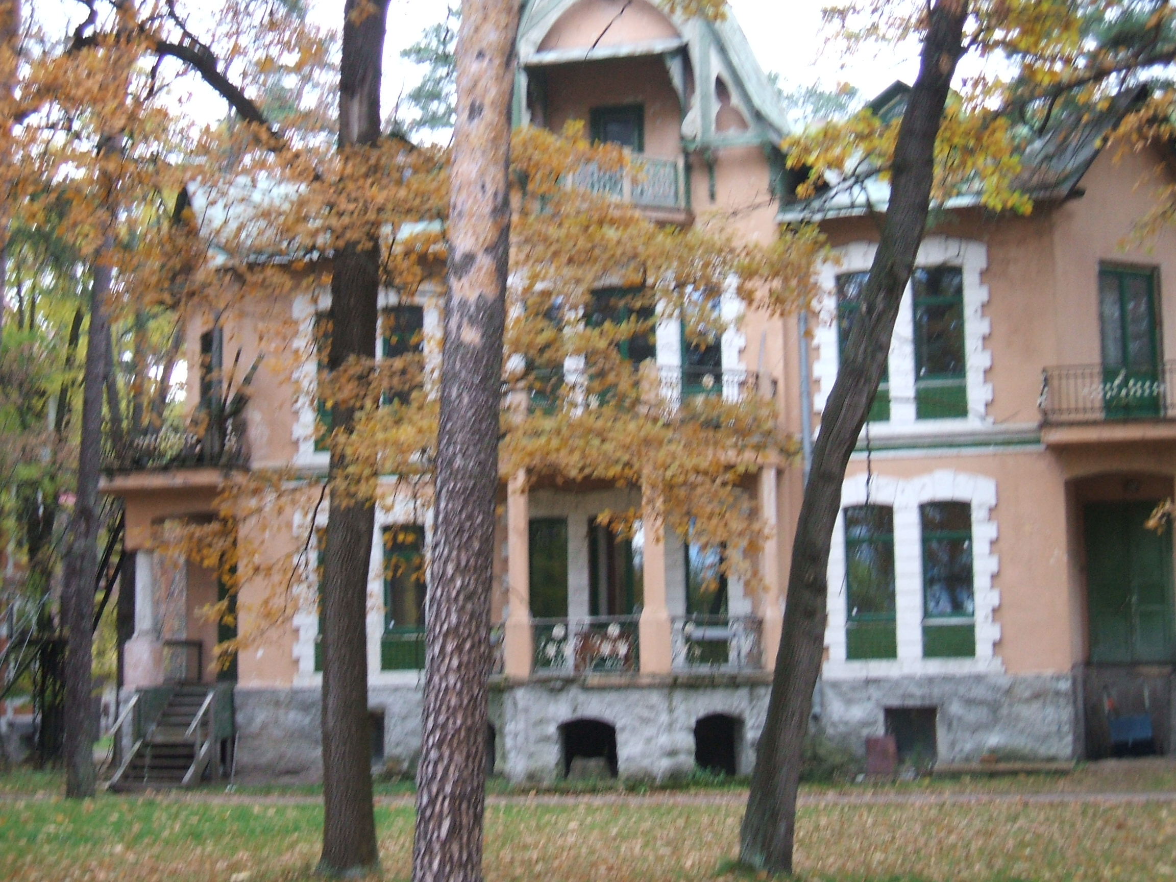 дача Косякова в Сестрорецке на ул.Григорьева корп.7